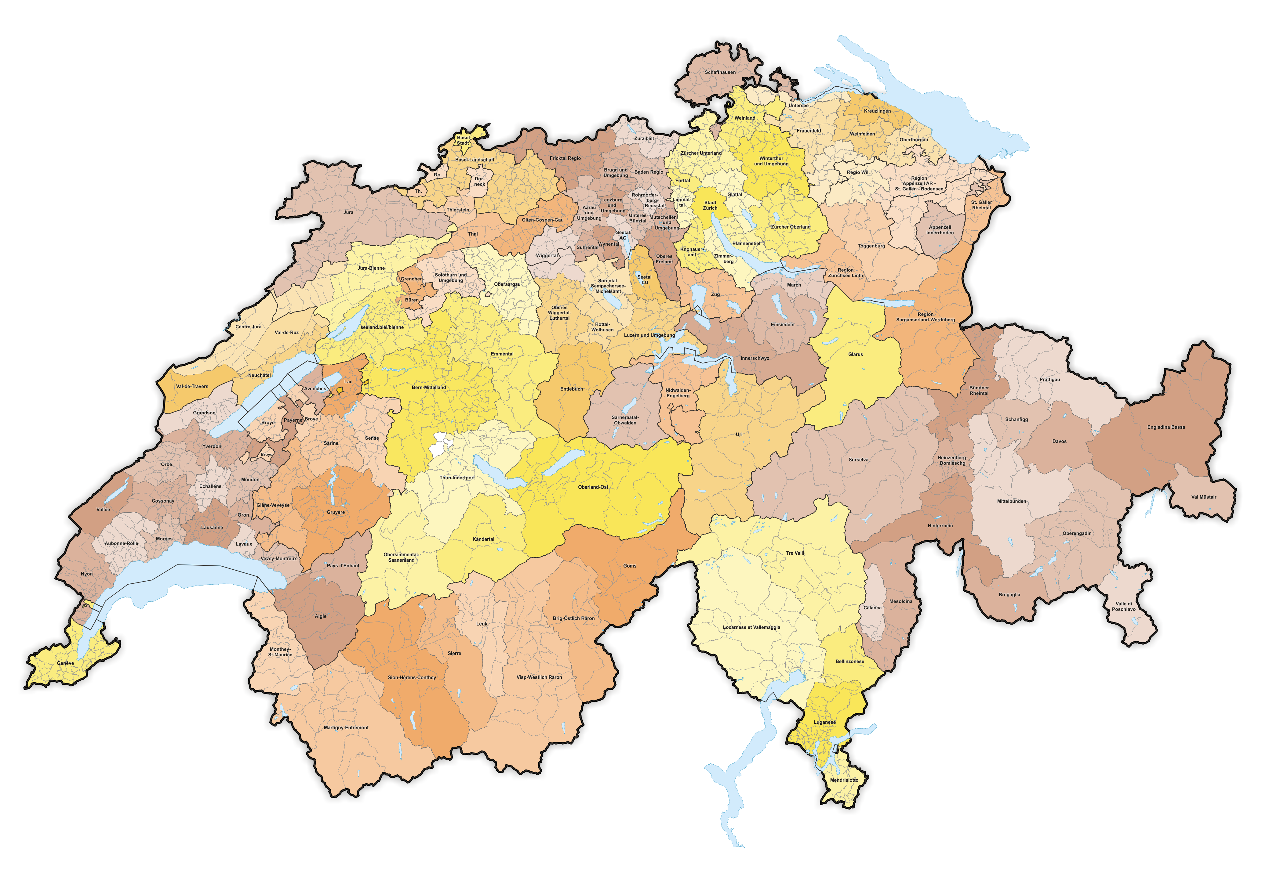 Raumplanungsregionen in der Schweiz